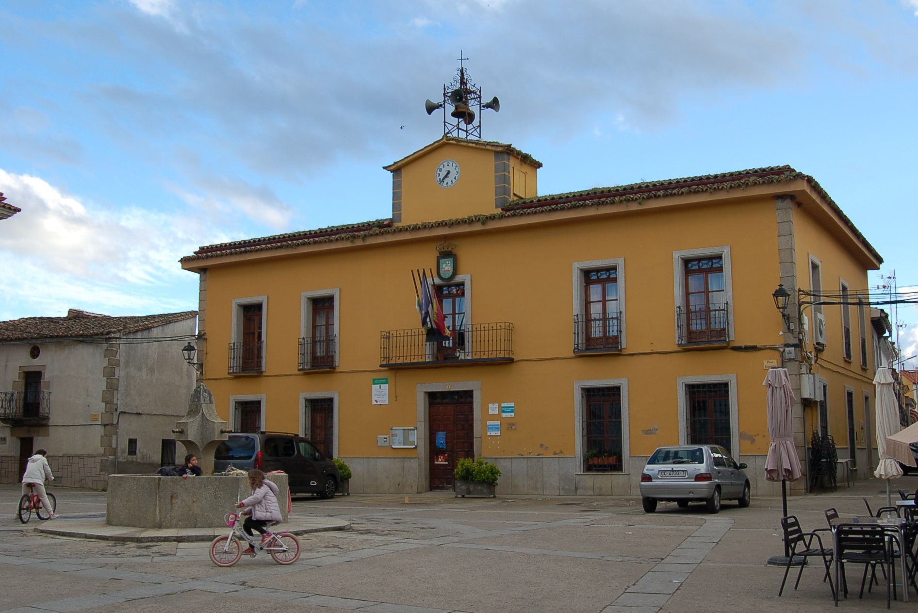 Casa consistorial Santibáñez el Bajo